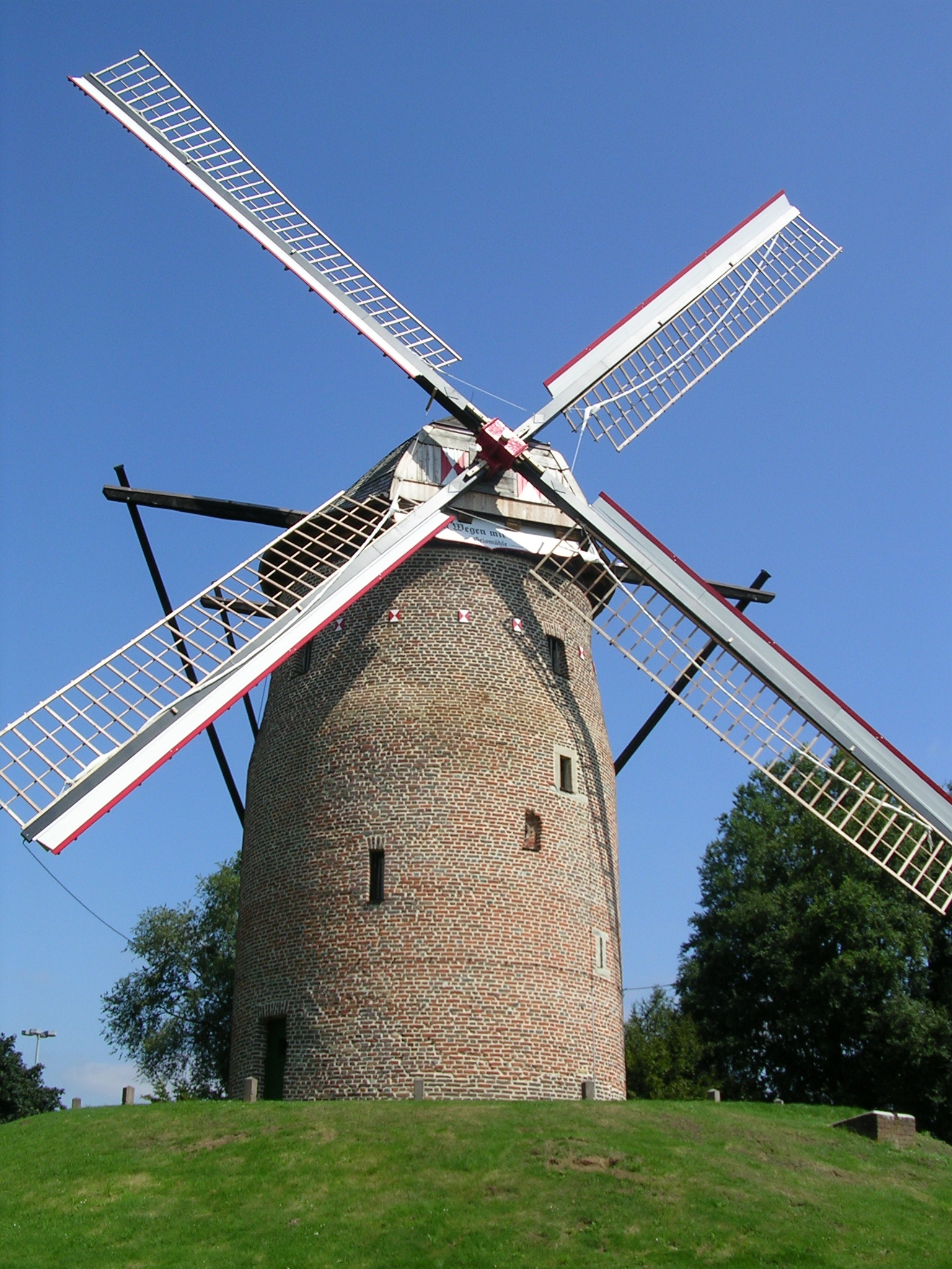 Krefeld-Oppum (North Rhine-Westphalia, Germany): Geismühle (windmill)